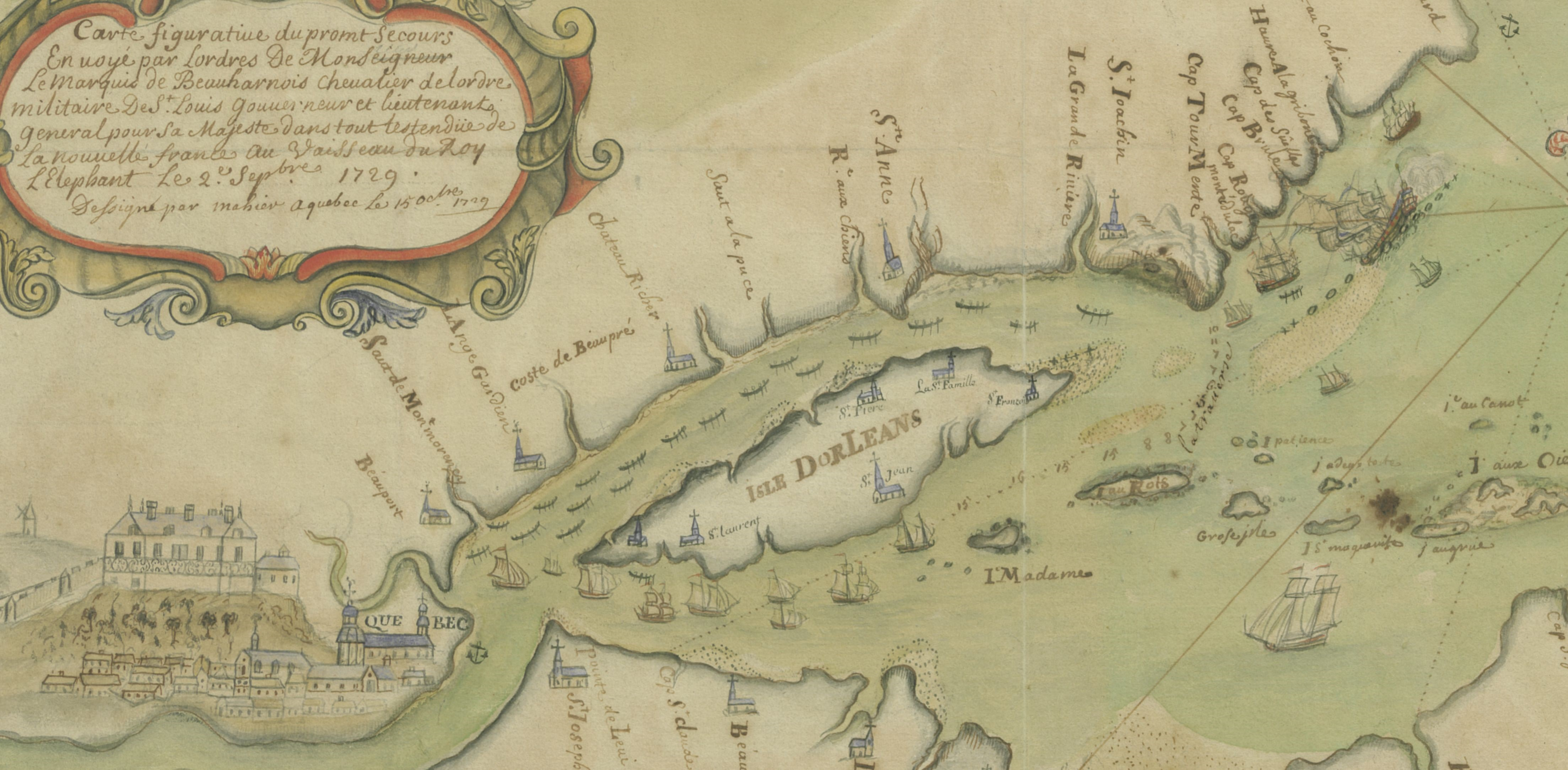 Détail d'une carte publiée en 1729 pour montrer les secours envoyés depuis Québec au navire l’Eléphant échoué dans le Saint-Laurent. Titre exact : Carte figurative du promt secours envoyé par l'ordres [sic] de Monseigneur le Mr de Beauharnois,... gouverneur et lieutenant général pour Sa Majesté dans tout l'estendue de la Nouvelle France, au vaisseau du Roy l’Eléphant, le 2 Septembre 1729. Dessigné par Mahier, à Québec le 15 octobre 1729. NB : La flûte l’Eléphant est figurée échouée sur les rochers en haut à droite de la carte.